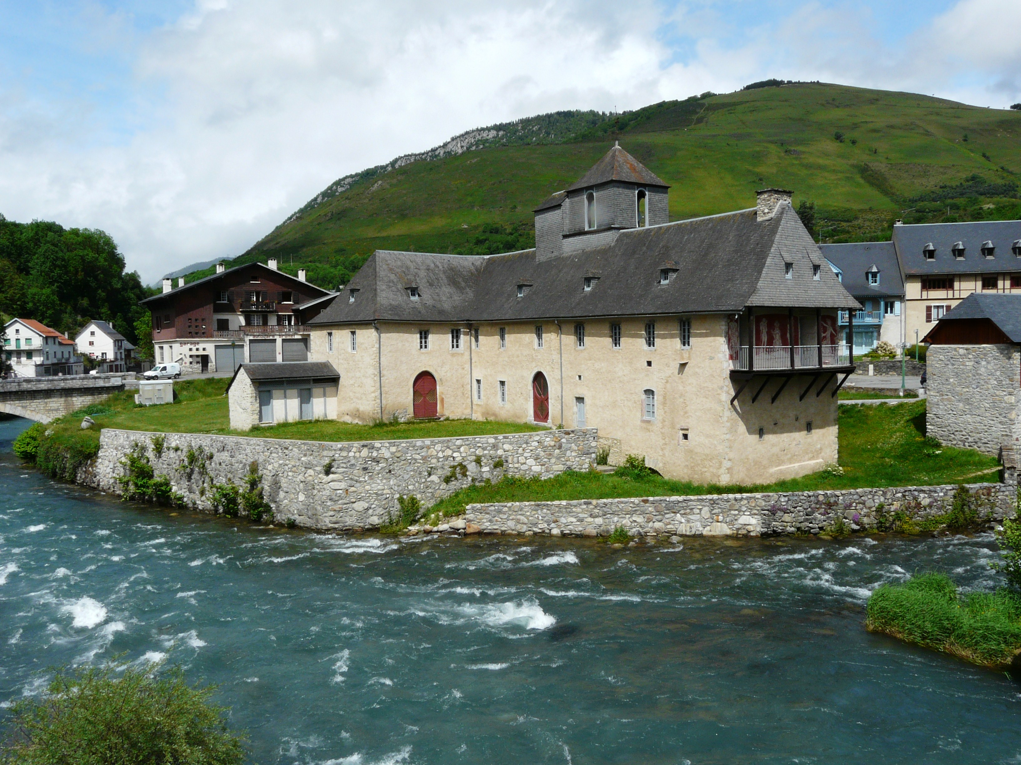 Le château des Nestes au confluent de la Neste du Louron et de la Neste d'Aure, Arreau, Hautes-Pyrénées, France.